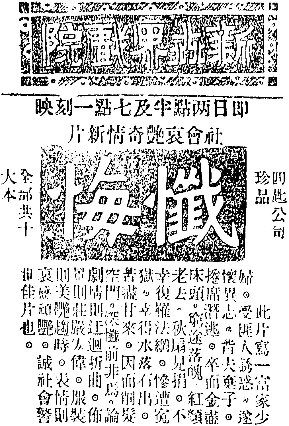 中文（香港）: 香港『四匙畫片公司（Key Company）』出品默片《懺悔（Repentance）》，原名《誰是真愛？》在1925年6月3日，星期三，在香港『新世界戲院（World Theatre）』首次公映時的廣告。